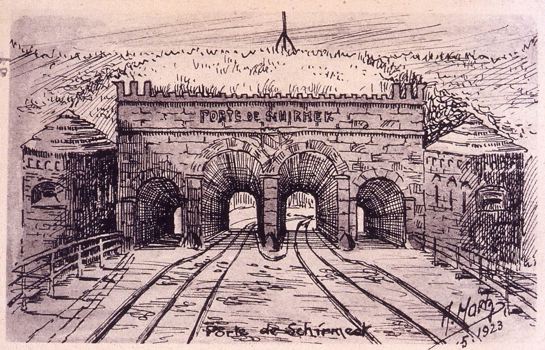 Dessin de la porte de Schirmeck à Strasbourg par A Maetz